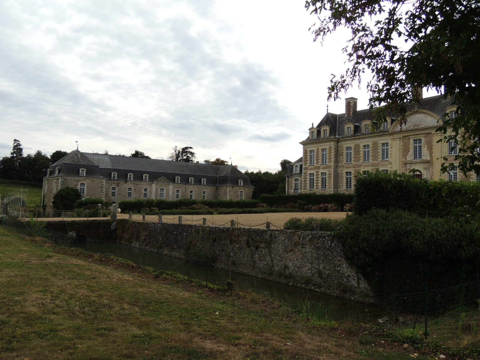 Ménil - 53 (Mayenne) Chateau de Magnanne